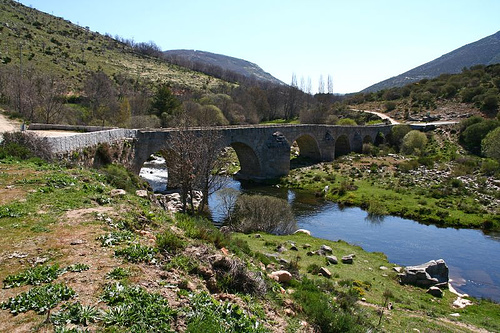 En Navalperal del Tormes, en la cara norte de Gredos, este puente sobre el Tormes comunica un valle magnífico con las faldas rocosas de las montañas. Es un puente recio, de piedra, con poca historia pero muchas historias a sus espaldas. He decidido cruzarlo, a última hora, para acercar ambas orillas, para superar obstáculos, en definitiva, para tender puentes. Víctor Cuevas